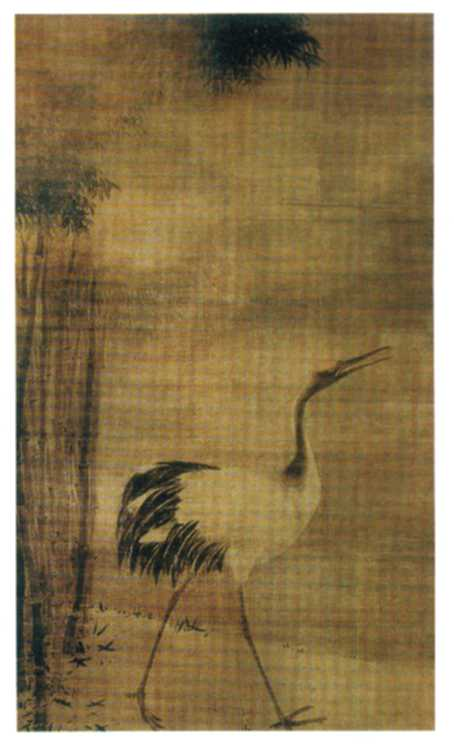 牧溪[鹤图]。